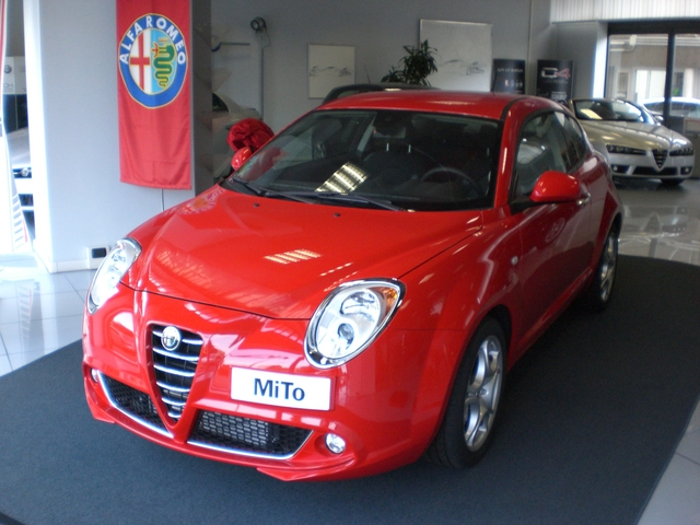 fronte alfa romeo mito